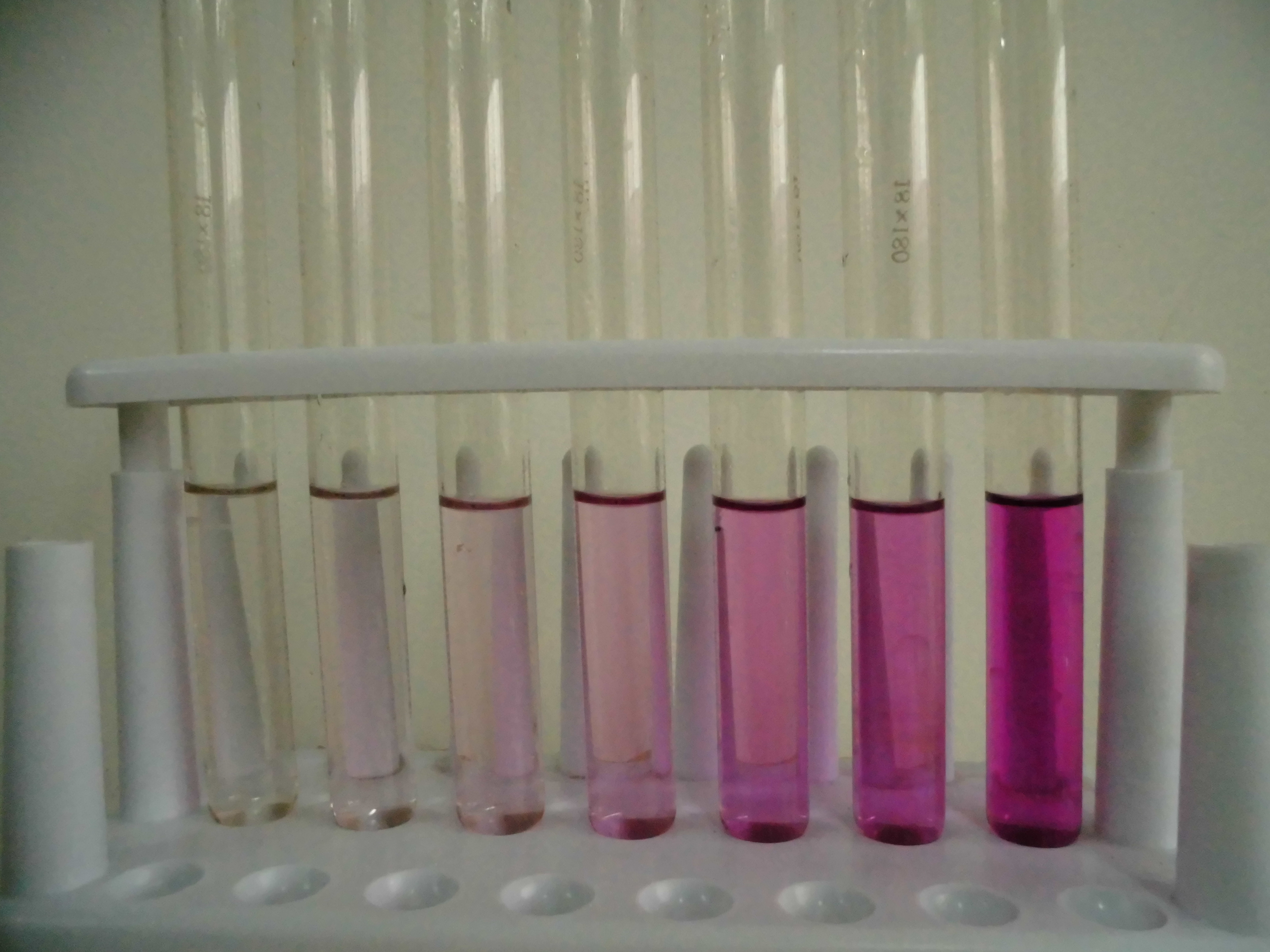 不同浓度的高锰酸钾溶液，从左到右0.000 005, 0.000 01, 0.000 02, 0.000 05, 0.000 1, 0.000 2, 0.000 25, 0.000 5 mol/L。